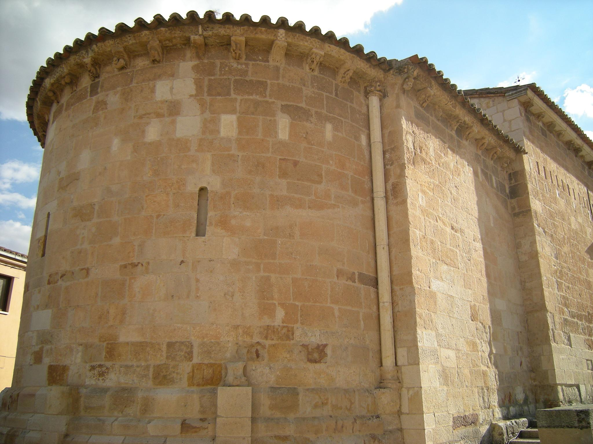 Iglesia construida en el siglo XII. Es de plante de nave única y ábside semicircular precedido de un tramo recto.